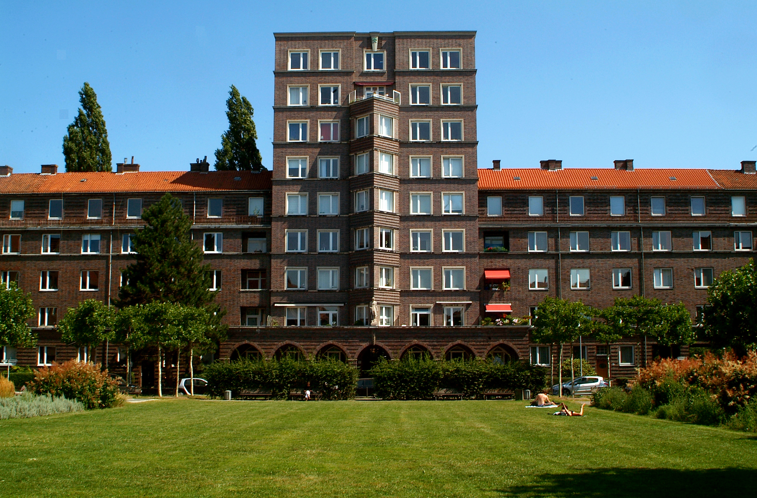 Blick über die Grünfläche des Geibelplatzes auf das Hochhaus Glückauf in der Südstadt von Hannover ...